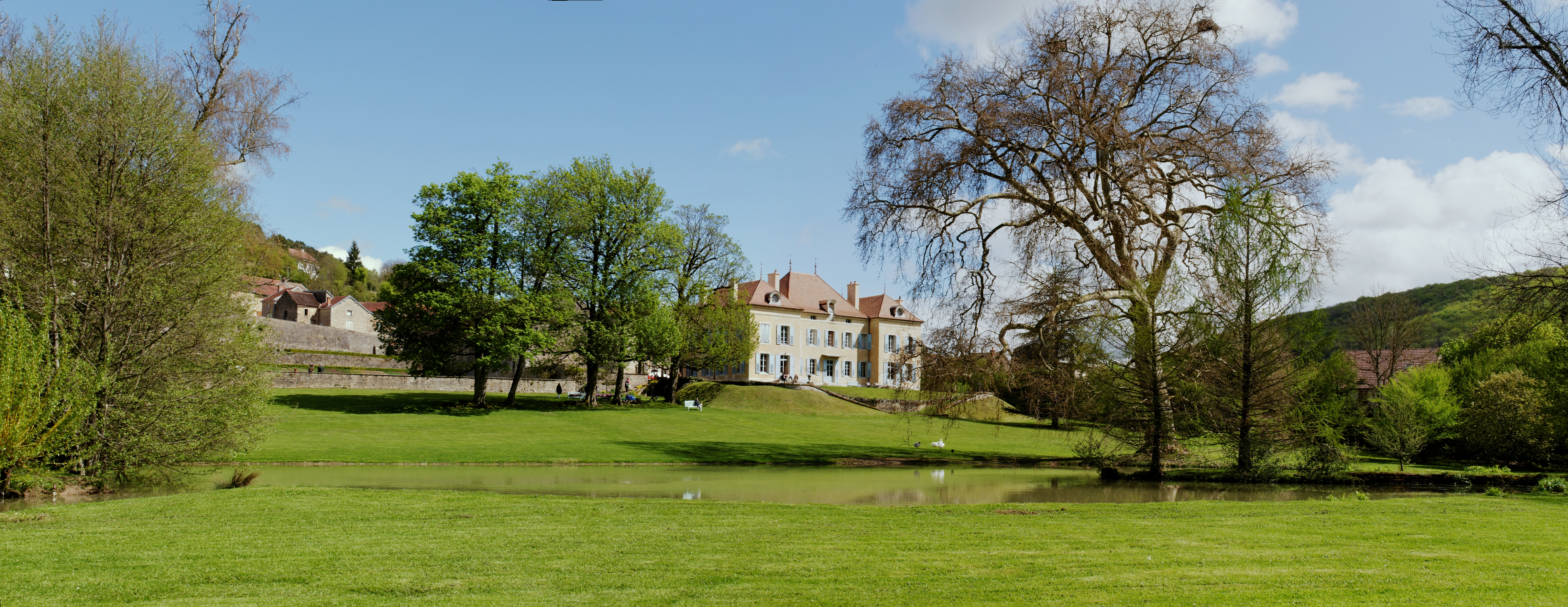 Vue panoramique du Château de Barbirey-sur-Ouche. (Côte d'Or). Photo prise depuis le parc.